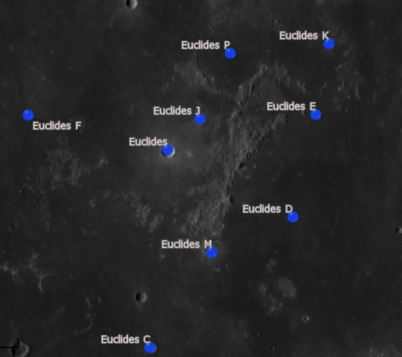 Cráter lunar Euclides. Localización. (Imagen LROC)